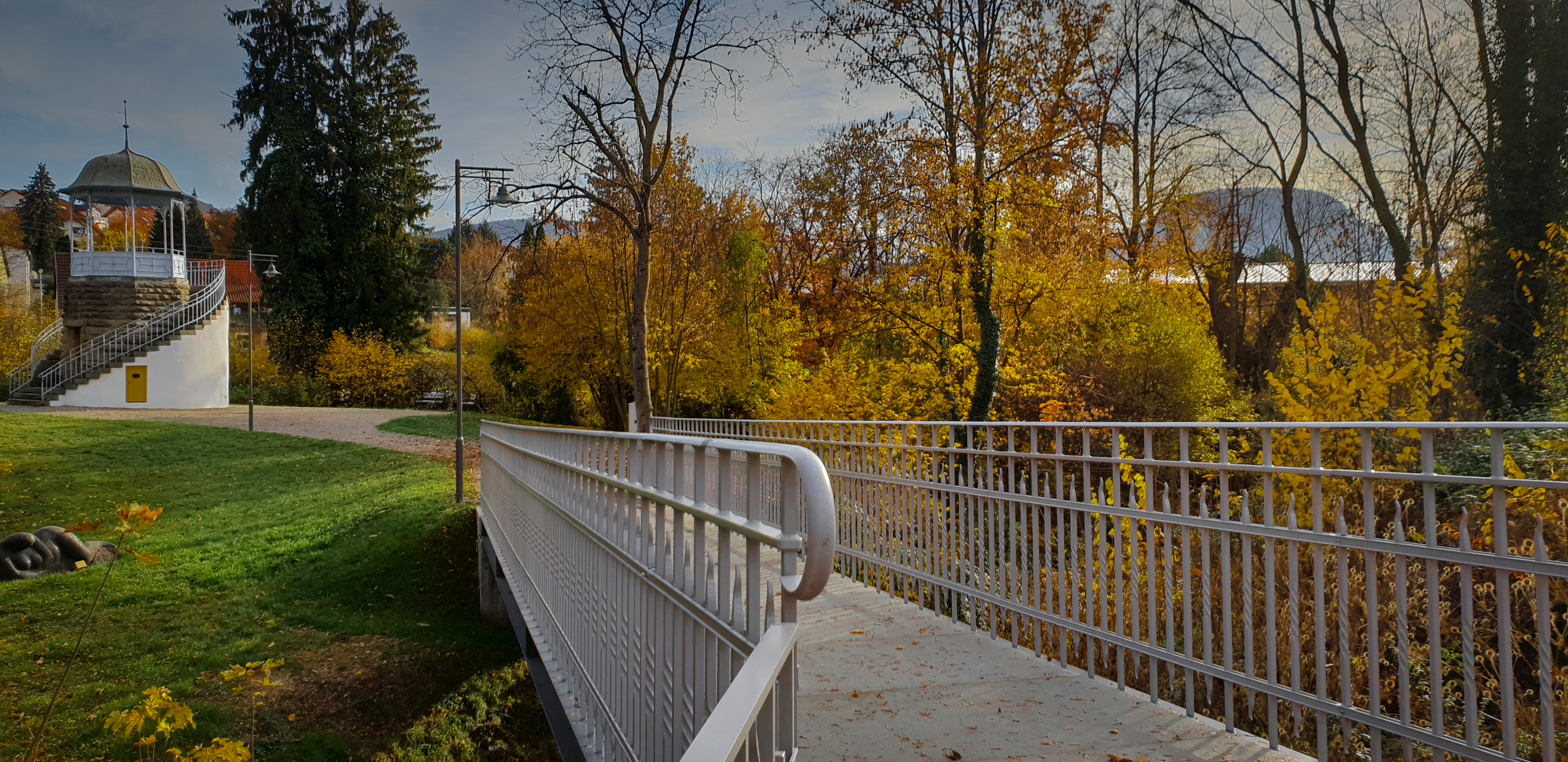 Die Parkanlage "Am Türmle" in Eningen unter Achalm, ehemals ein privater Lustgarten. Seit 2017 steht der Park der Öffentlichkeit zur Verfügung. Auf dem Bild sieht man außerdem die Skulptur "Die Liegende" des Künstlers Eduard Raach-Döttinger.